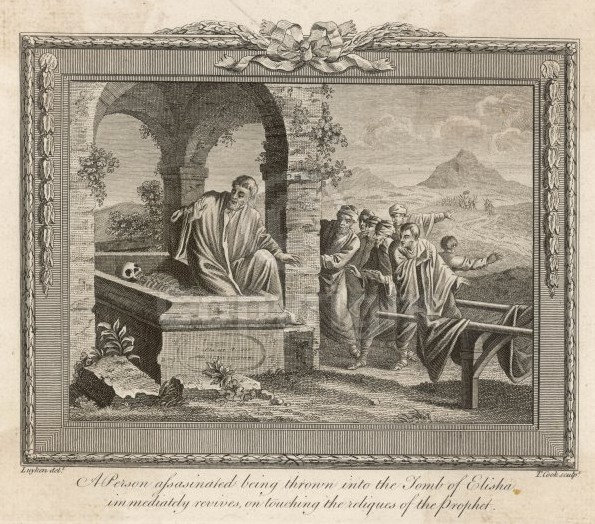 Légende en anglais: "A person assasinated being thrown into the Tomb of Elisha, immediately revives, on touching the reliques of the Prophet" ("Une personne qui avait été assassinée, se trouvant jetée dans la tombe du prophère Elisée, retouve la vie dès qu'elle touche les reliques du prophète")